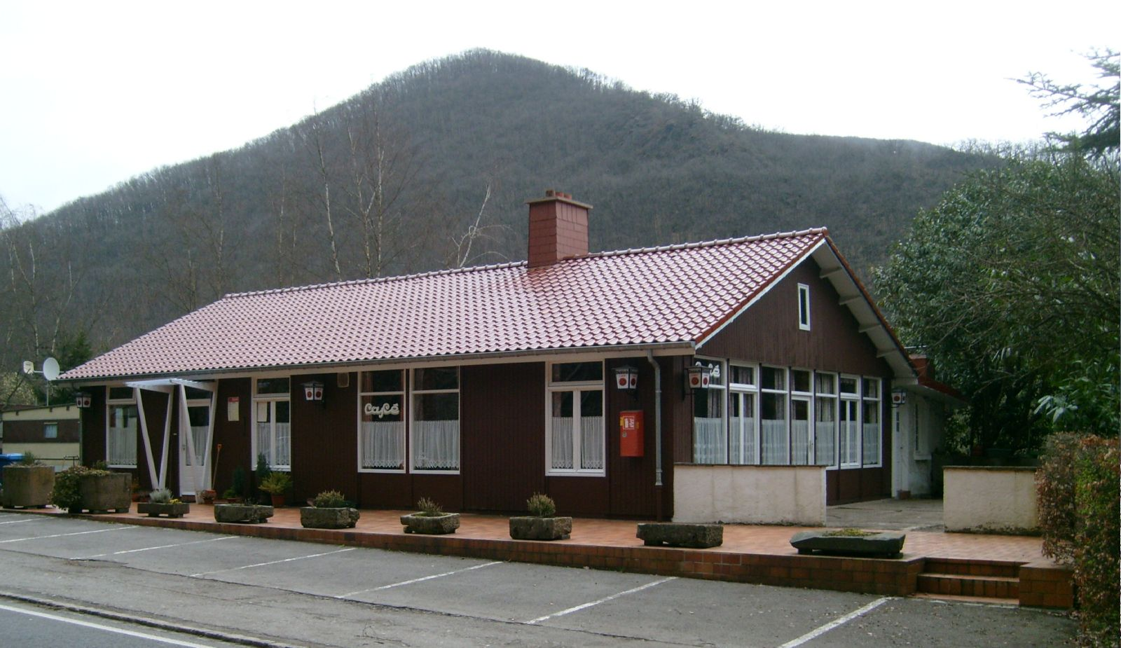 D'Biwelser Millen.